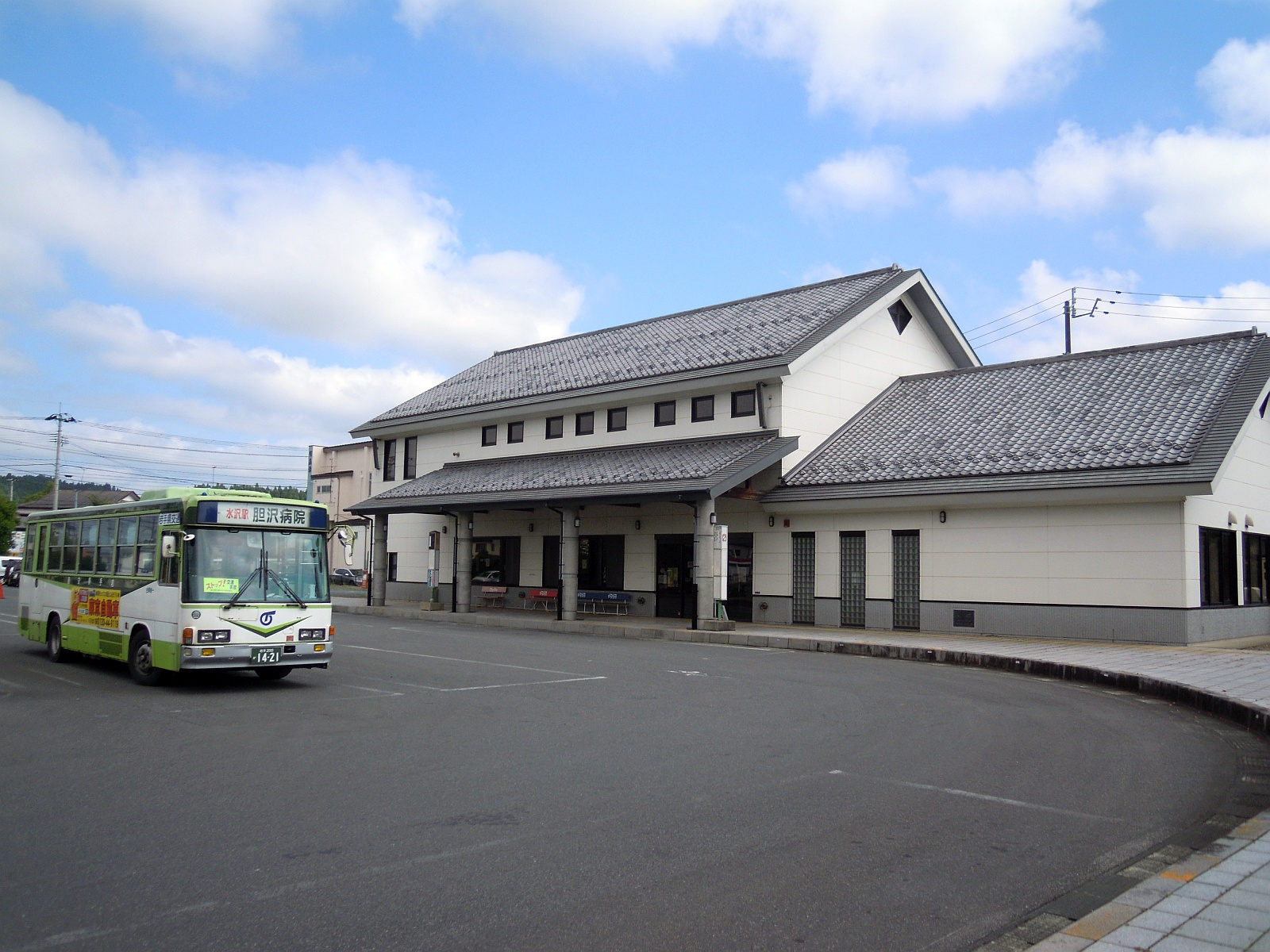 岩手県奥州市江刺区の江刺バスセンターと停車中の岩手県交通バス